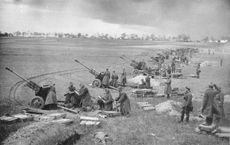 Sowjetische Artillerie vor Berlin ADN-ZB/Archiv II.Weltkrieg 1939-45 Am 16. April beginnt der Angriff der an der Oder und Neiße stehenden 1. Belorussischen und 1. Ukrainischen Front zum Kampf um Berlin. Die sowjetischen Truppen erreichen am 21. April den äußeren Verteidigungsgürtel und schließen am 25. April die Stadt ein. Nach harten, verlustreichen Kämpfen kapitulieren die faschistischen Truppen der Berliner Garnison am Nachmittag des 2.Mai. - Sowjetische Artillerie vor Berlin; seit dem 20. April wird die Stadt beschossen.